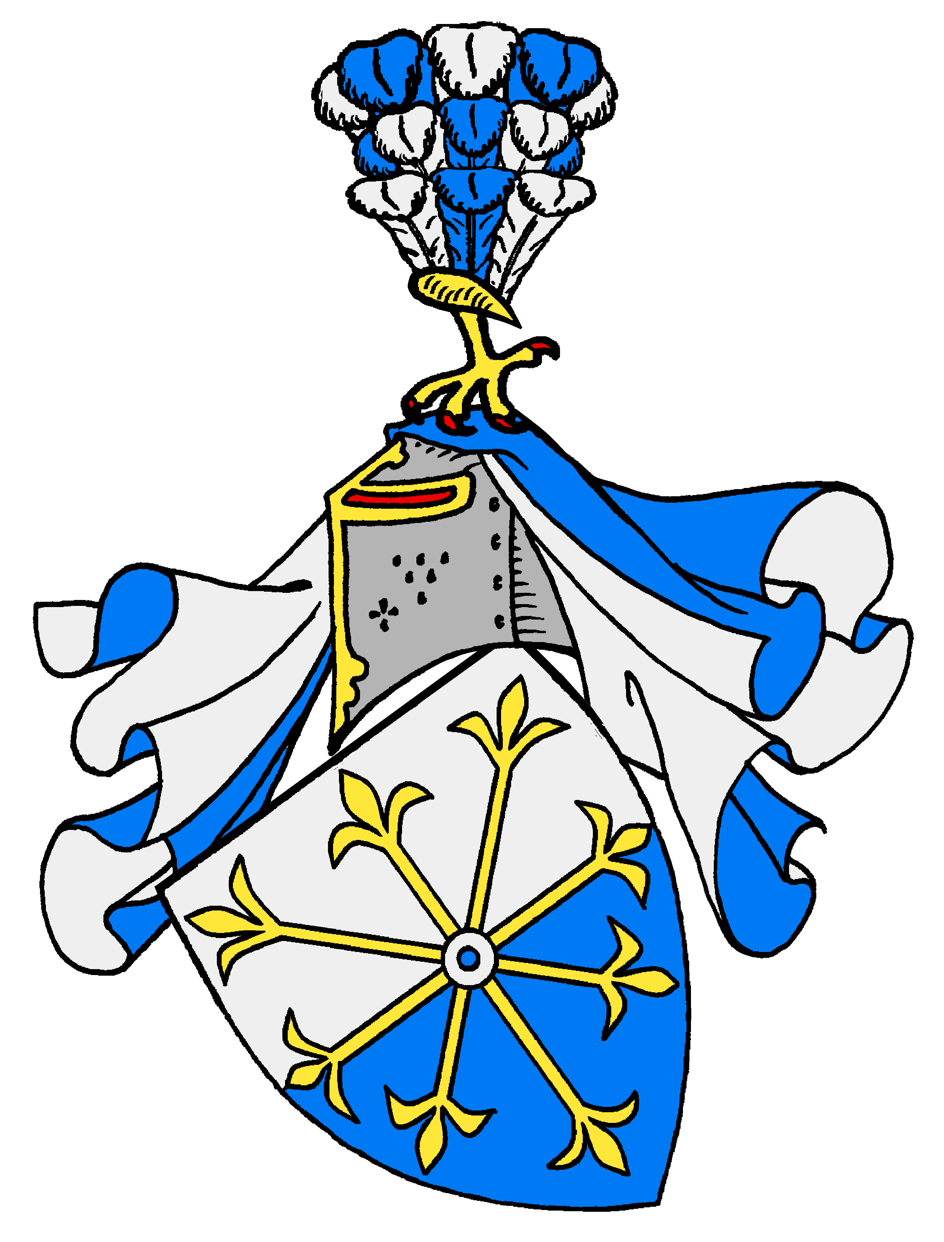 Stammwappen der Greiffenclau, Rheingauer Uradel; urkundlich seit 1211; seit 1337 als Besitzer von Vollrads nachgewiesen; der Mittelrheinischen Ritterschaft zugehörig. [1]